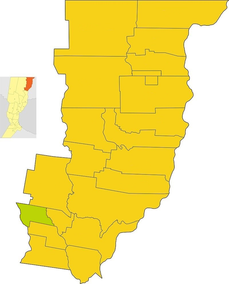 Localización de la Comuna de El Arazá en el Departamento General Obligado, Santa Fe, Argentina.